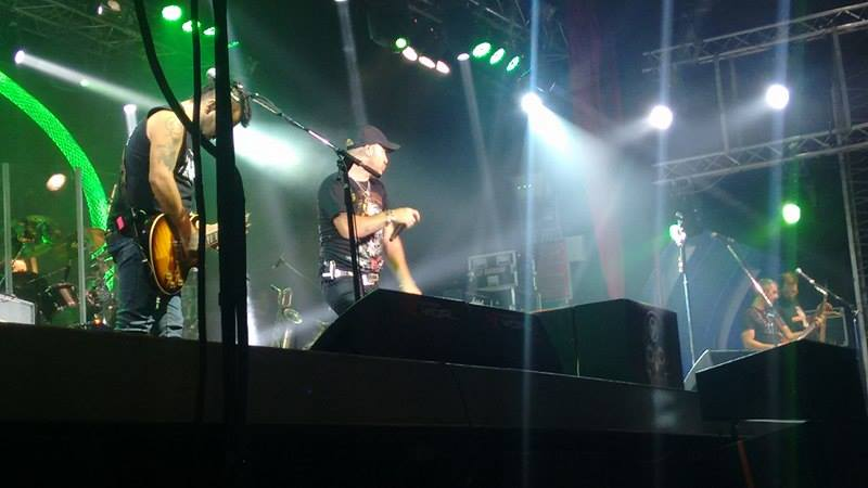 La Beriso en Mendoza.